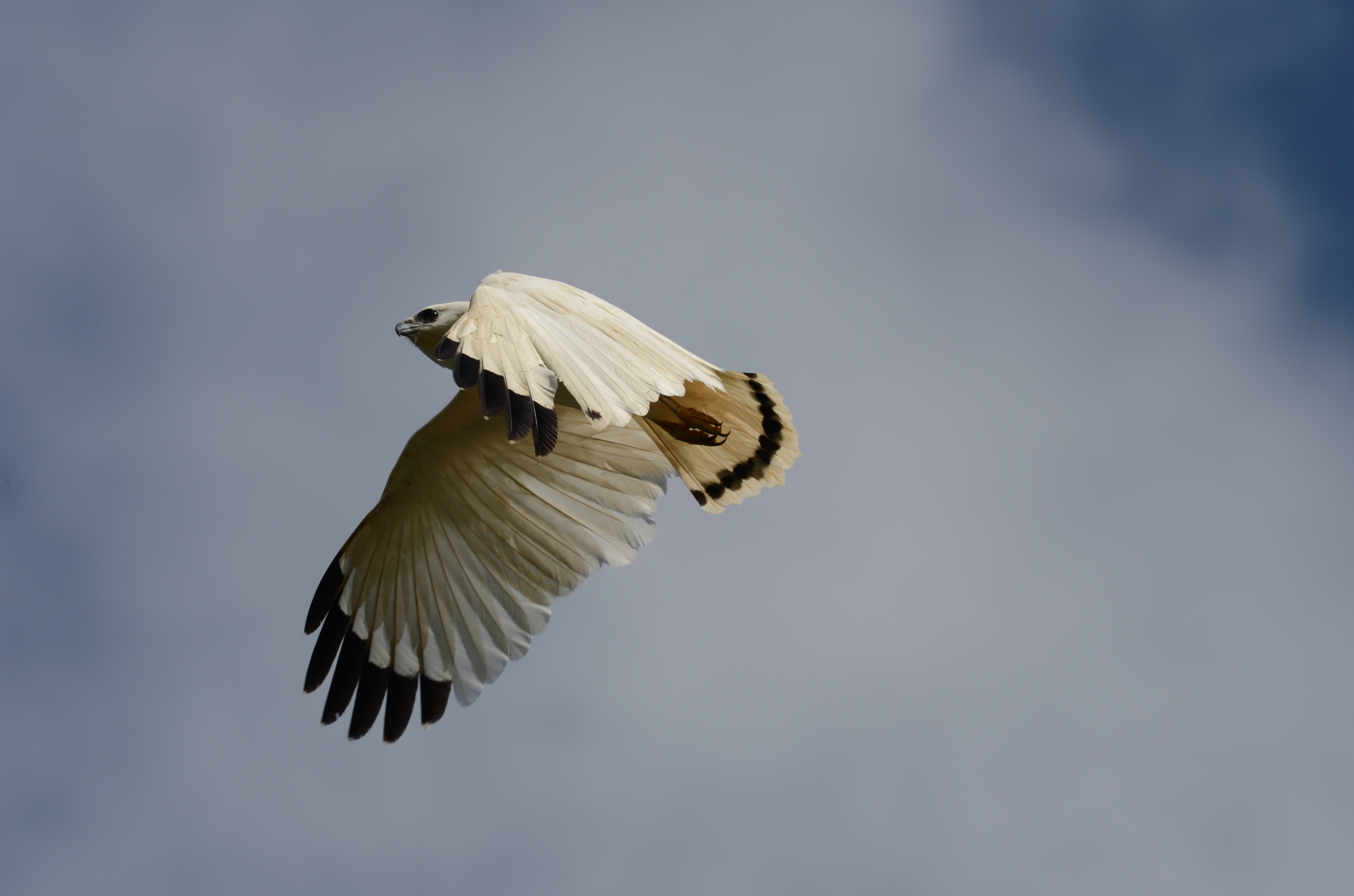 Selva El Marinero, Ejido Adolfo López Mateos, Catemaco, Veracruz, México.